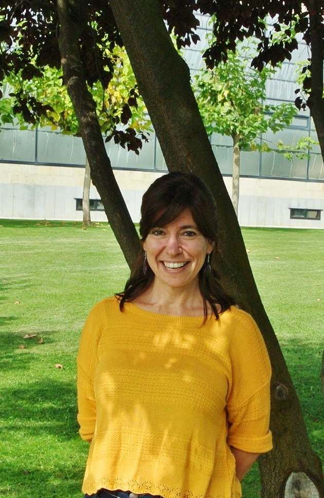 Yayo Herrero en 2015